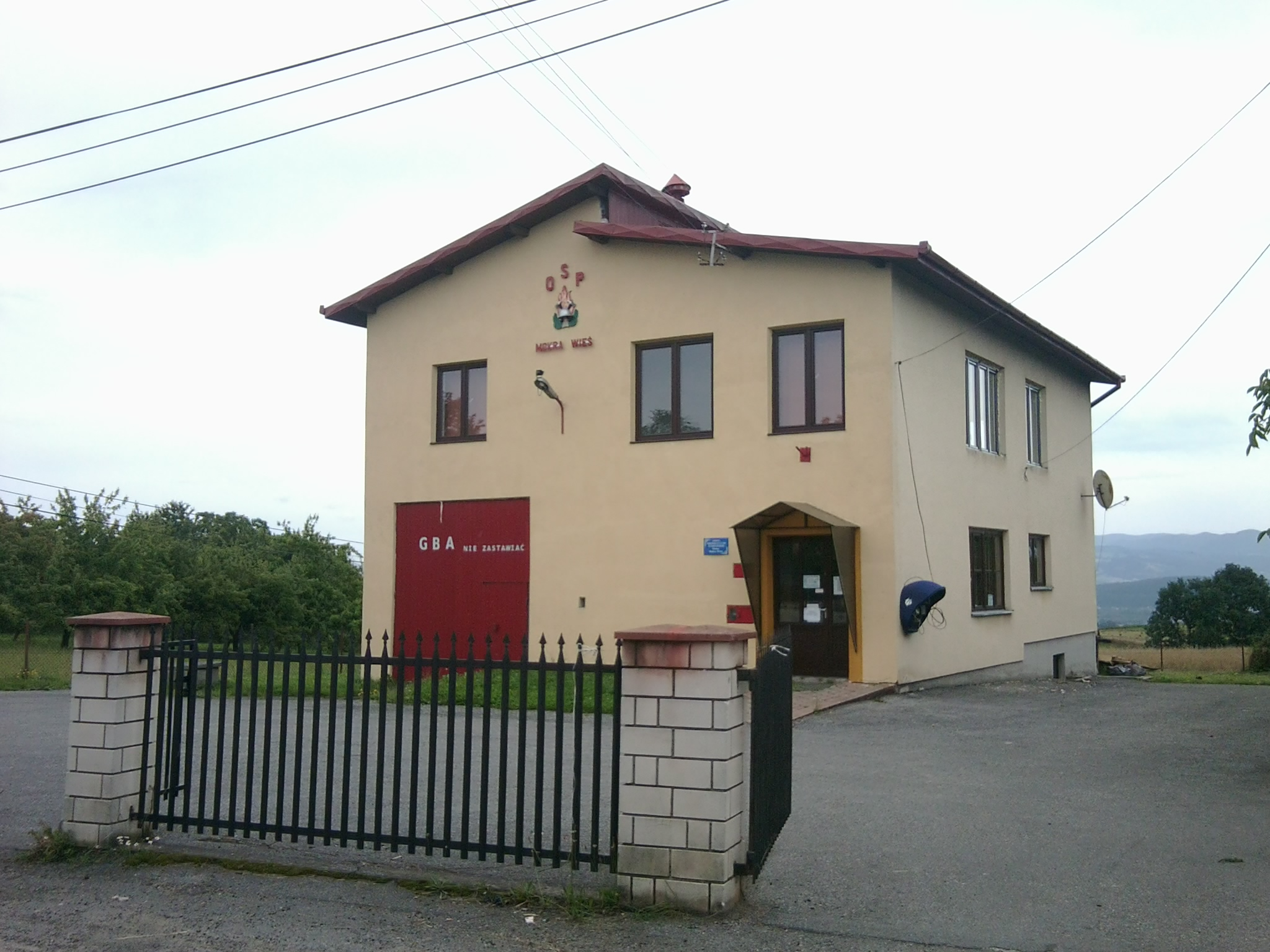 Remiza OSP w Mokrej Wsi